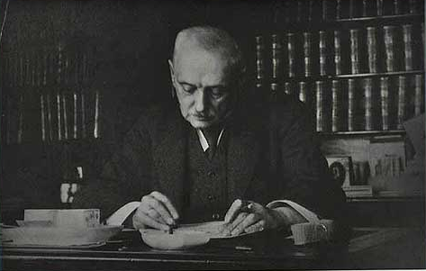 Carl Valeur